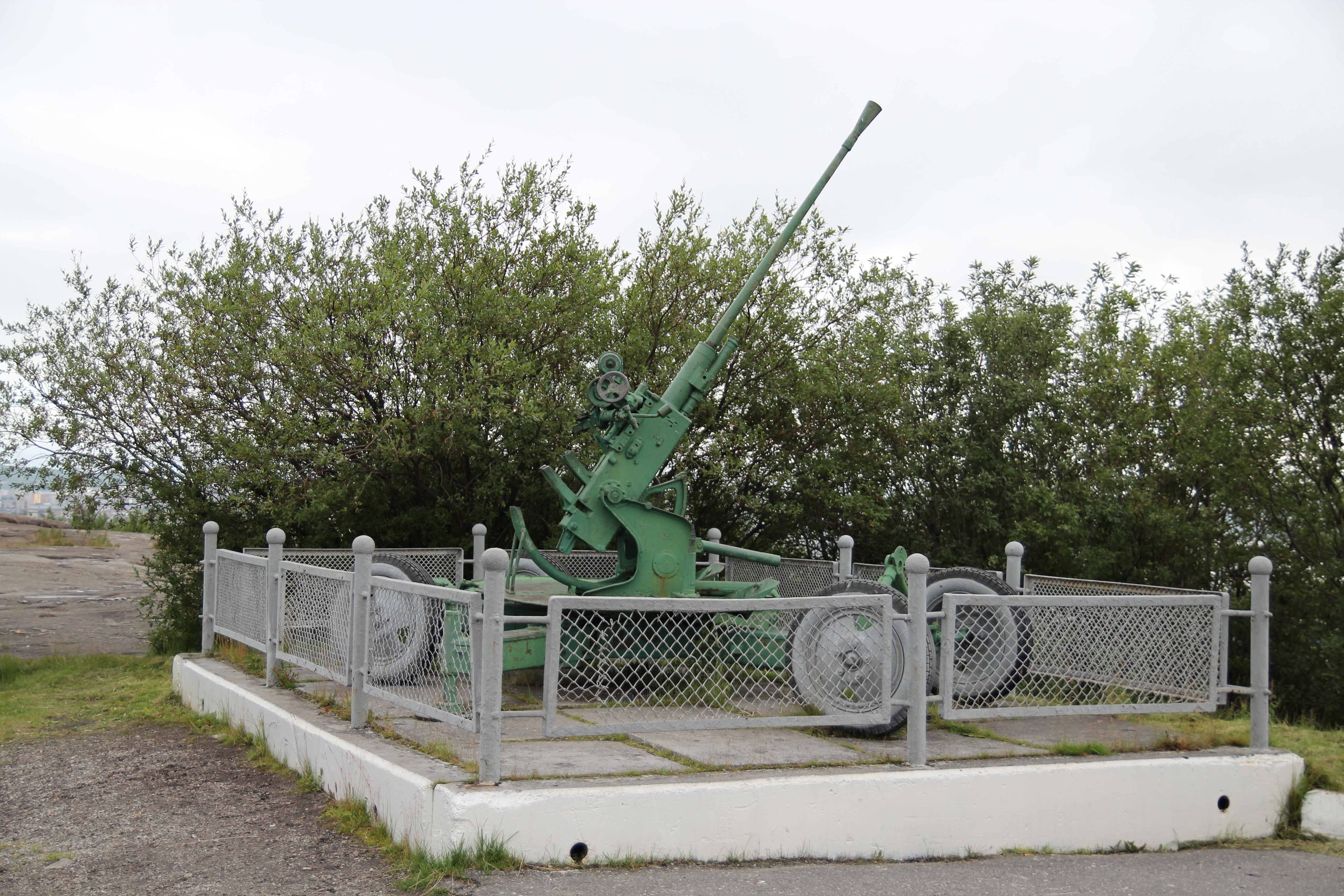 Артиллерийское орудие у Алёши